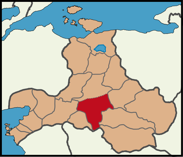 Balıkesir ilinde Altıeylül'ün konumu